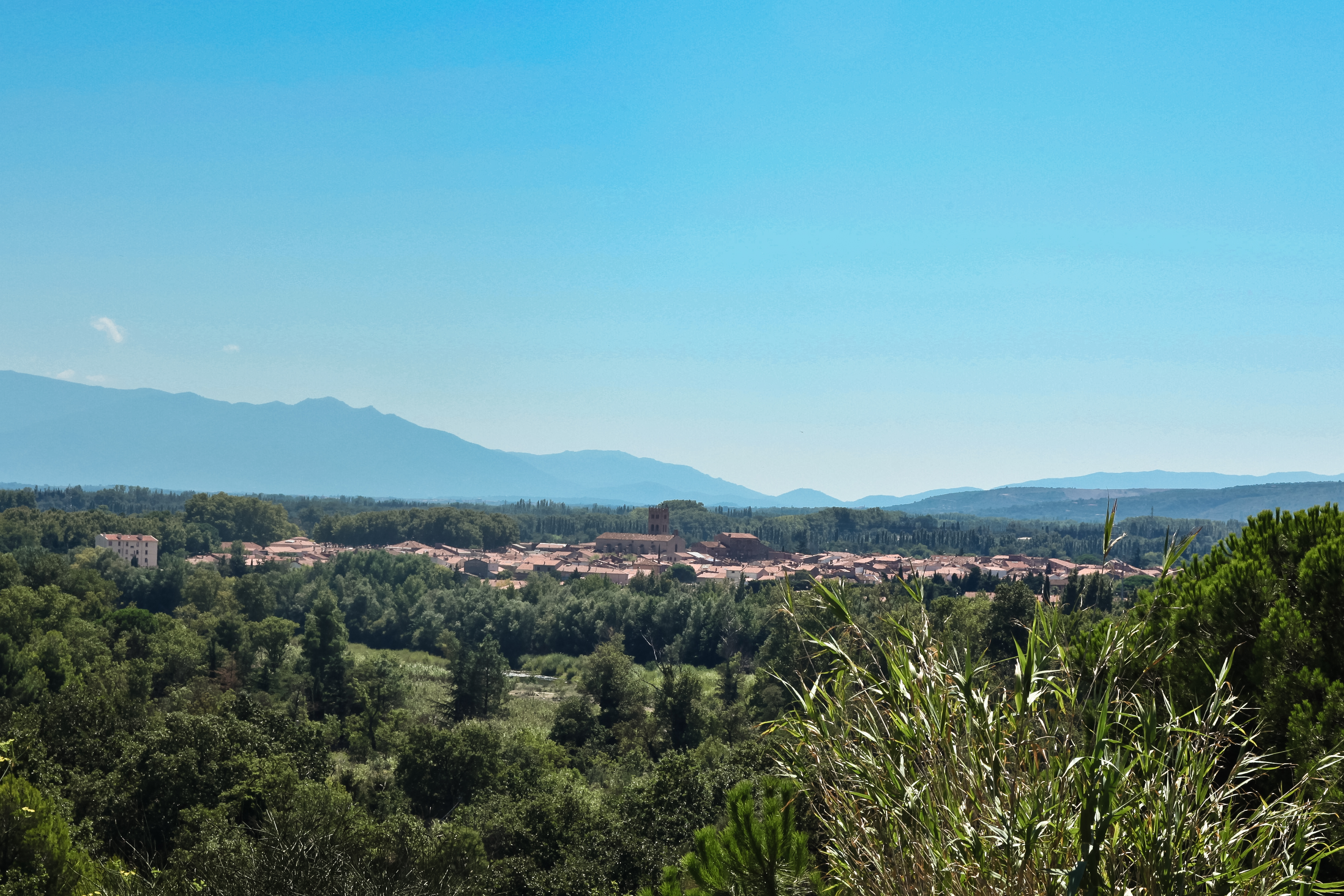 Vue générale de la ville de Millas